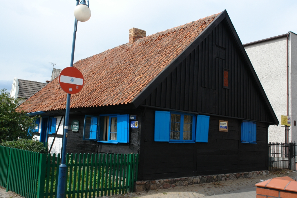 Zabytkowa chatka rybacka w Jastatnii